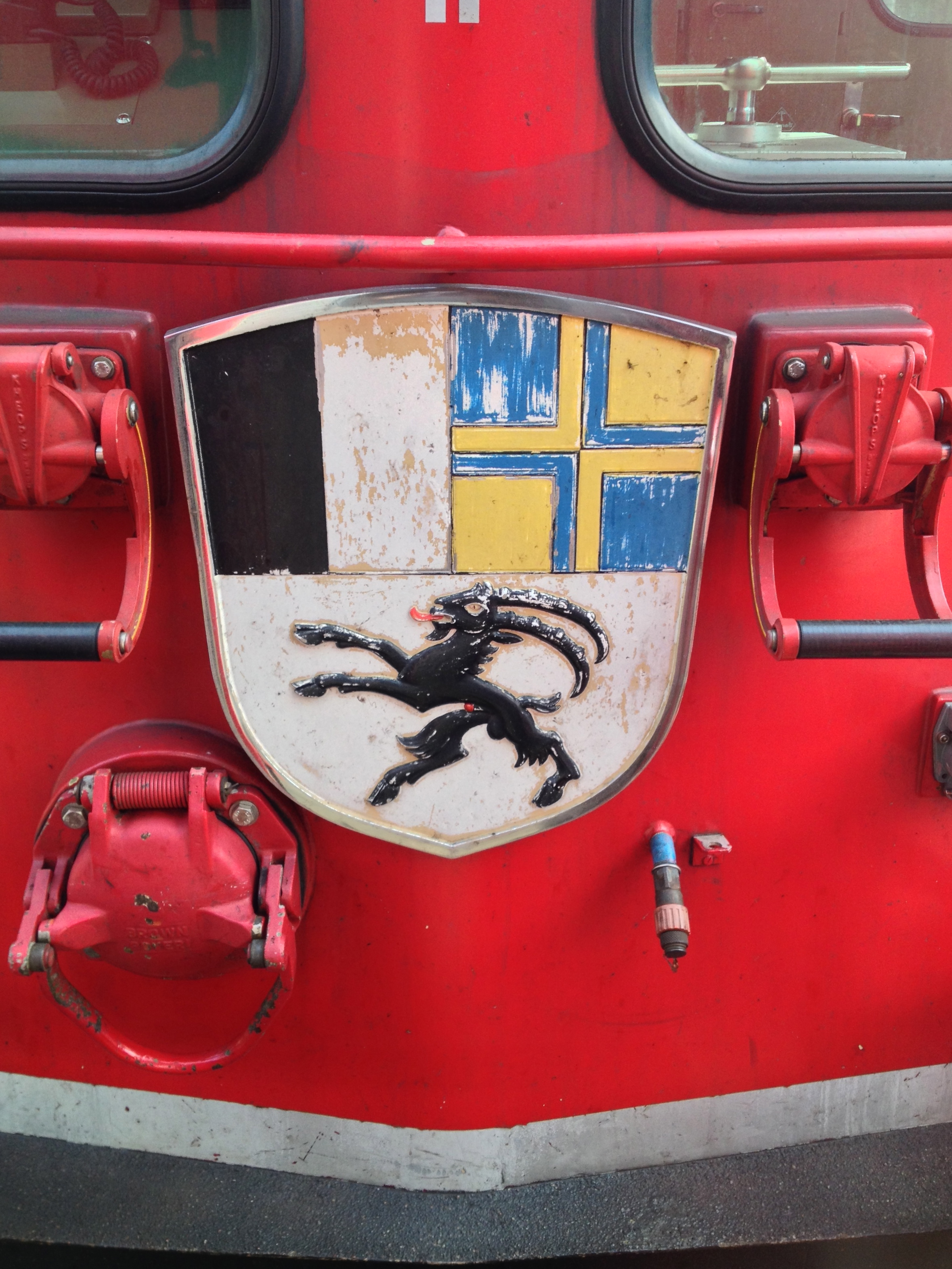 Bündner Wappen an einer Lok der Rhätischen Bahn